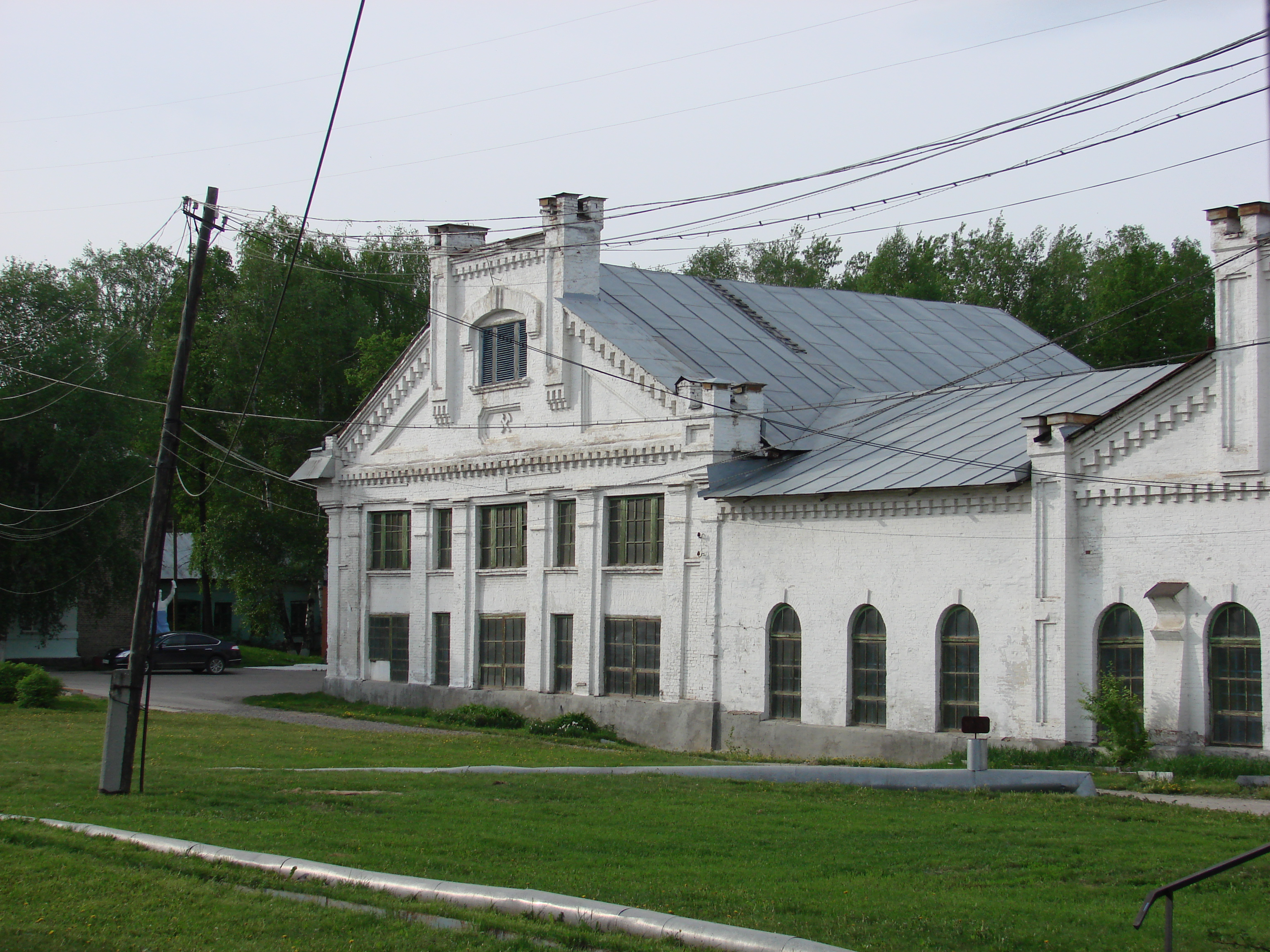 Нязепетровск, машиностроительный завод им.М.И.Калинина, ул.К.Маркса, 1А, механический цех №3